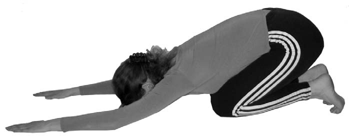 Баласана